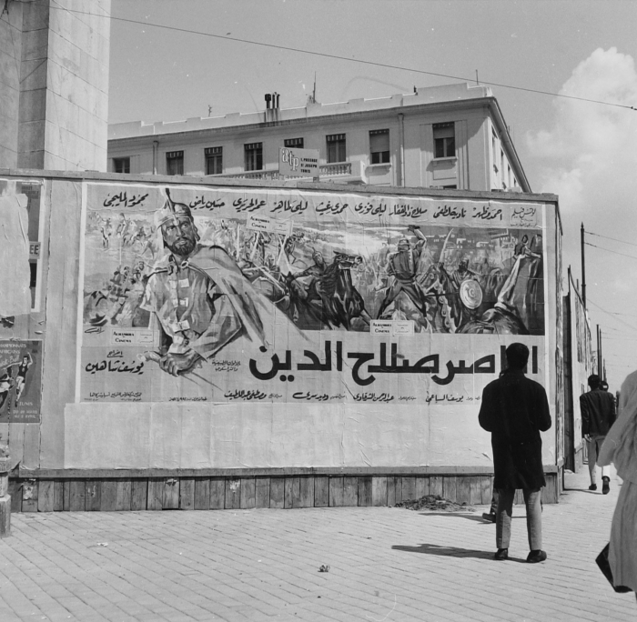 Affiche voor de film An-nasir Salah ad-Din (Egypte, 1963) van regisseur Youssef Chahine.